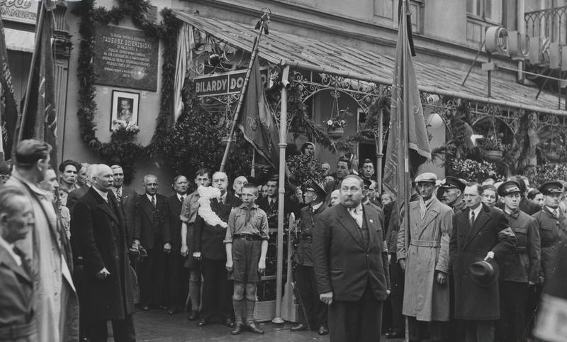 Odsłonięcie tablicy poświęconej Tadeuszowi Dzierzbickiemu z OB PPS w 1938 na ul. Miodowej 6 w Warszawie